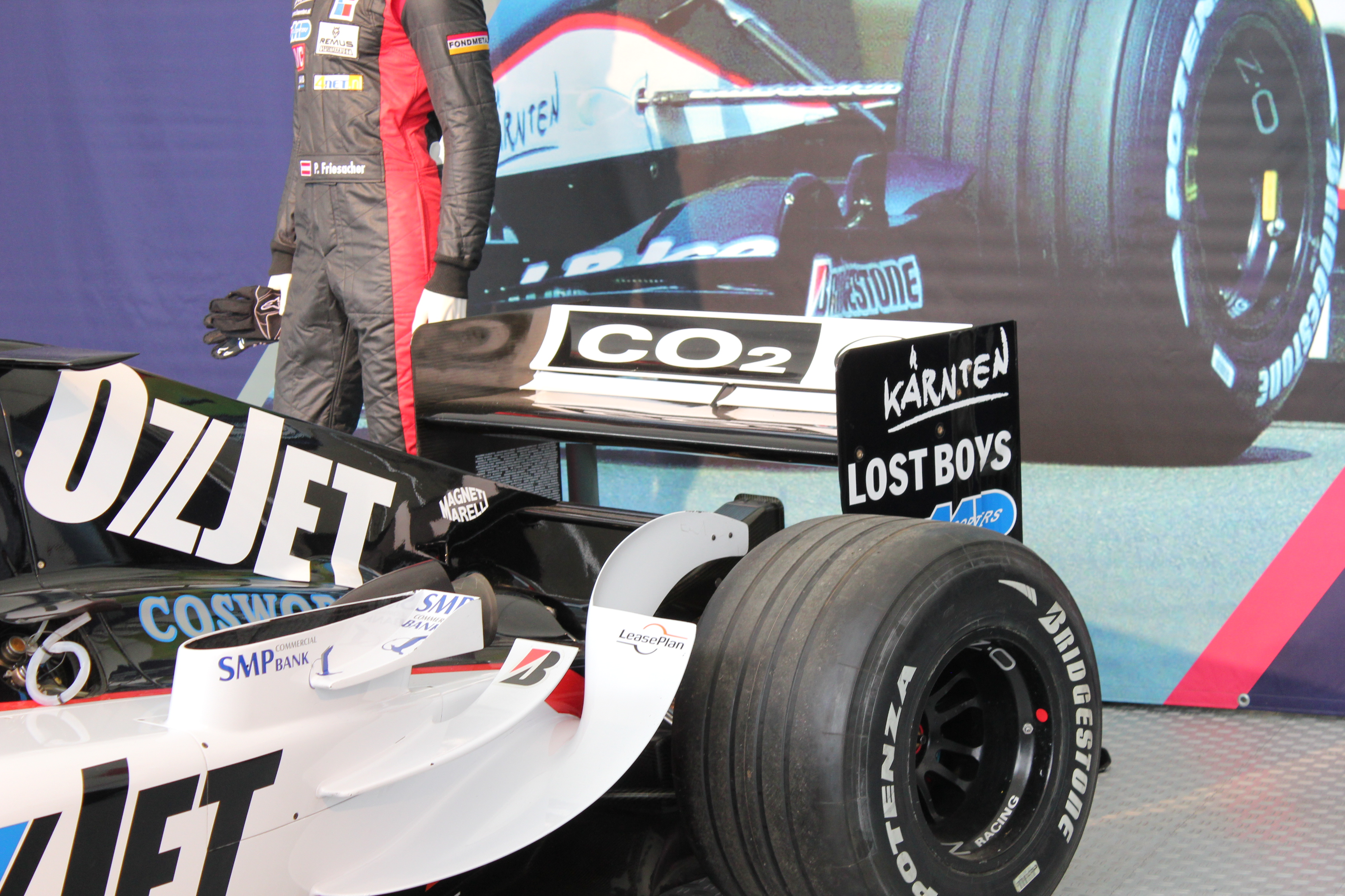 Das Heck eines Minardi PS05